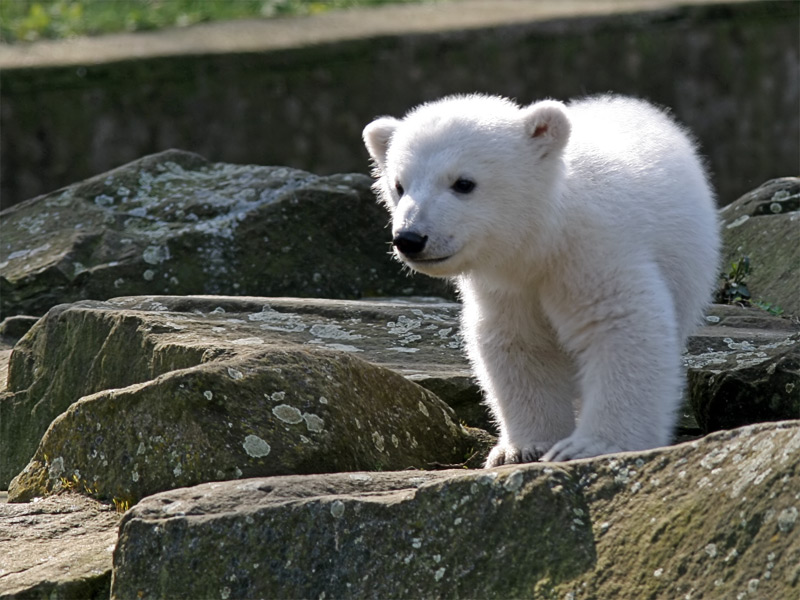 Knut am 24.03.2007 im Zoologischen Garten Berlin